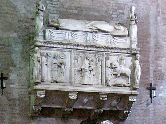 Carpi, Chiesa di Santa Maria in Castello: navata destra, sarcofago di Manfredo Pio (1351).